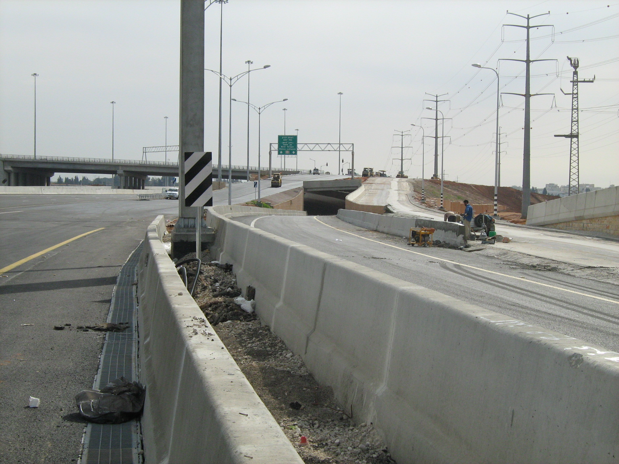 מחלף נס ציונה